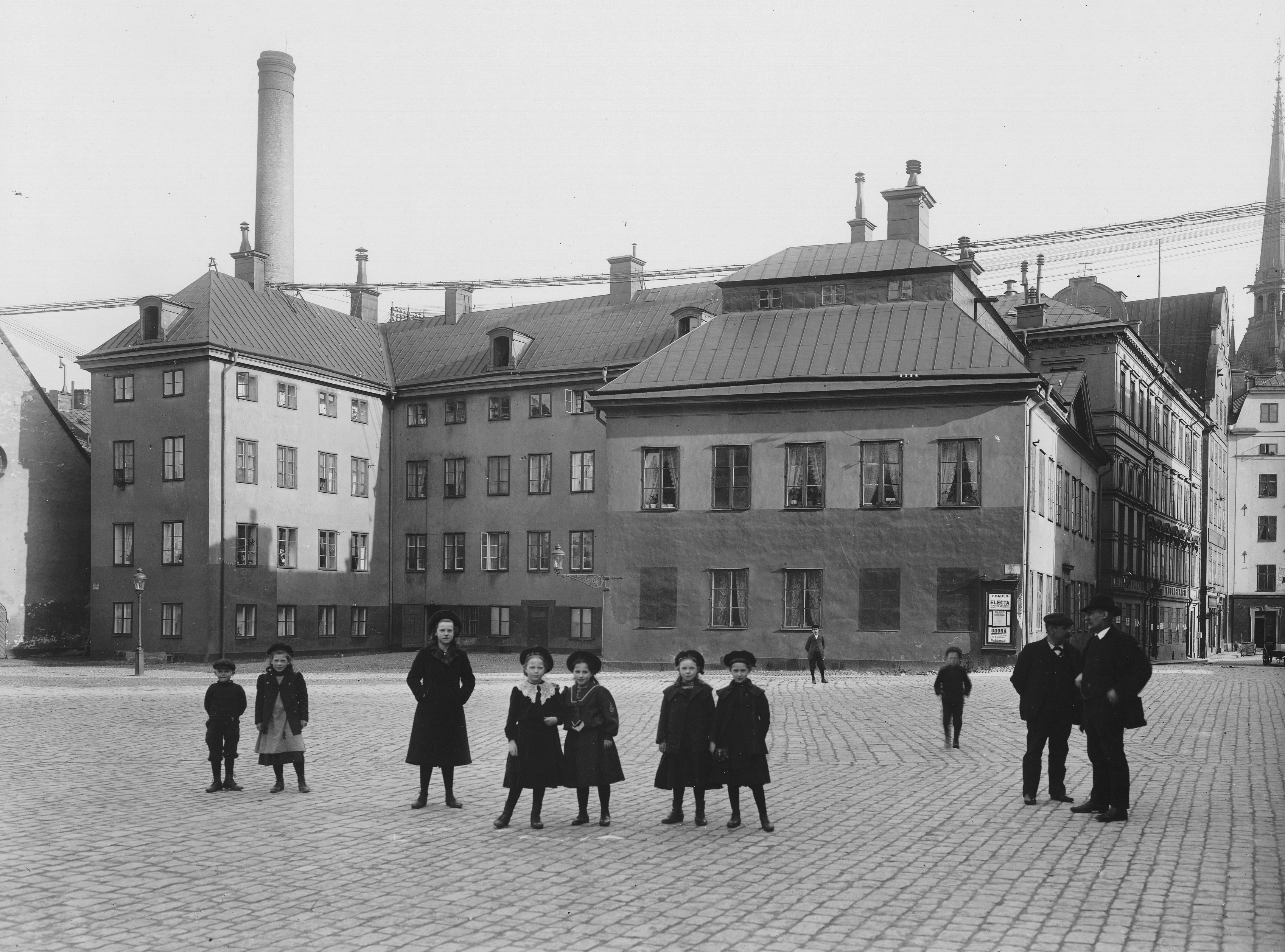 Indebetouska huset strax före rivning